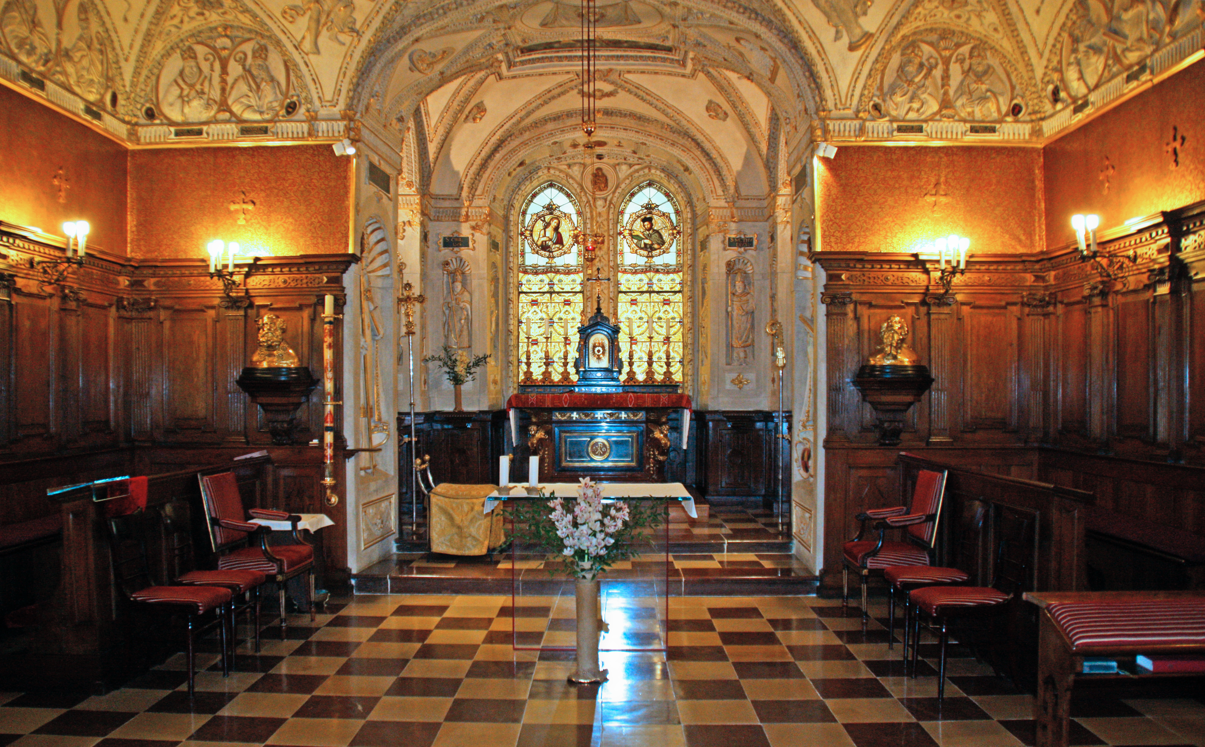 Kapelle im Erzbischöflichen Palais Prag